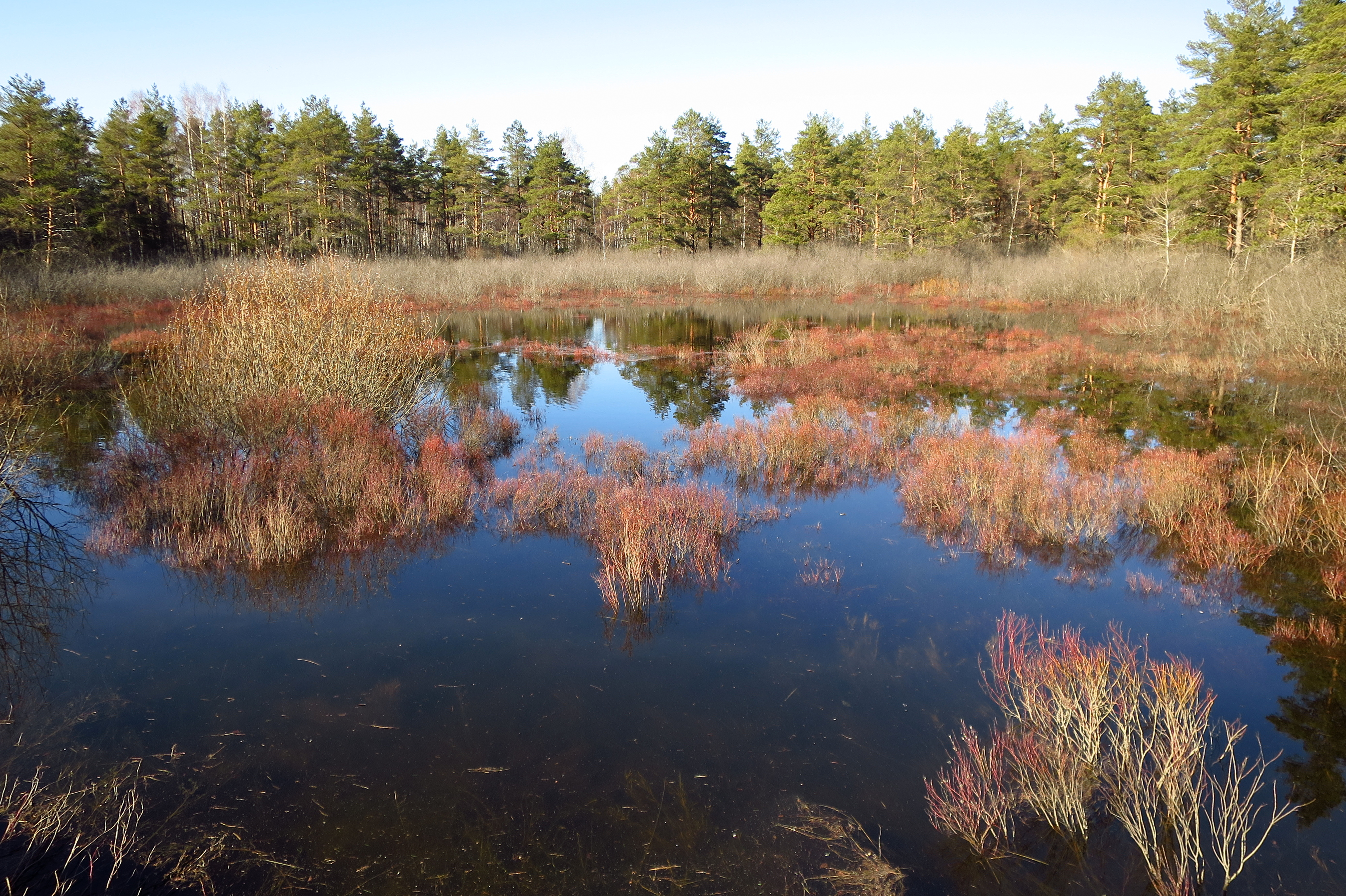 Aniste karstijärv kevadel